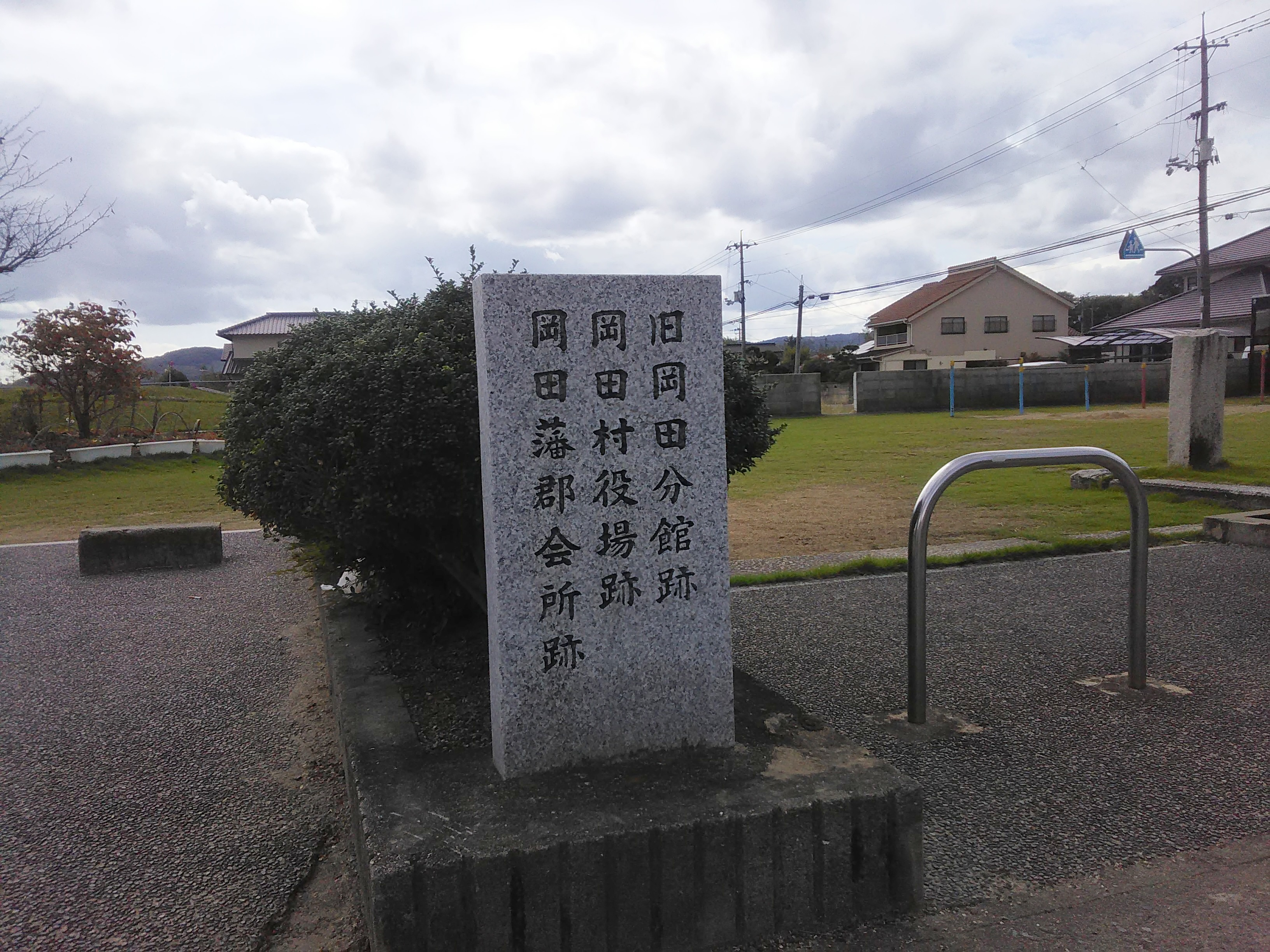 村役場が在ったことを示す石碑